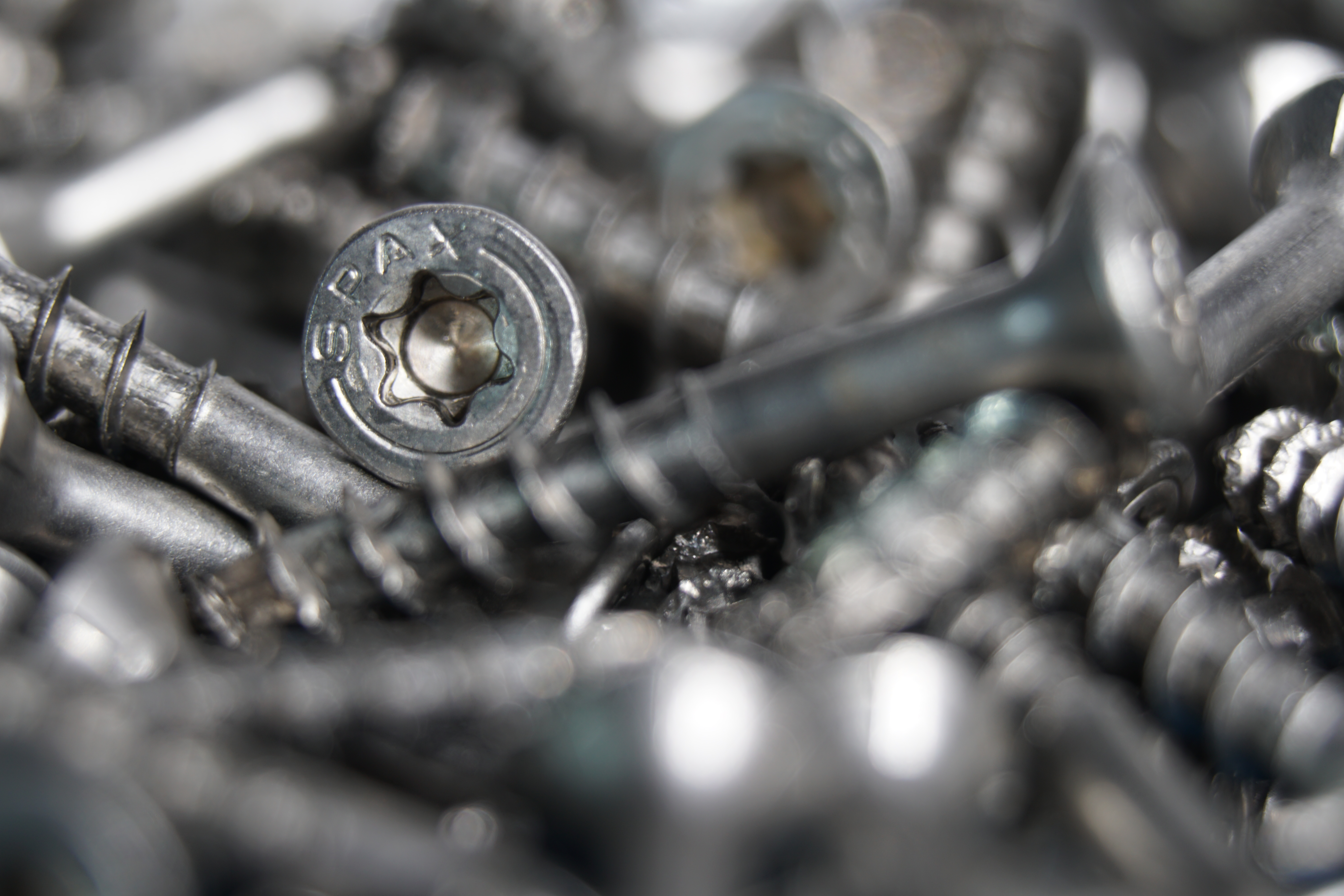 Torx skrutky